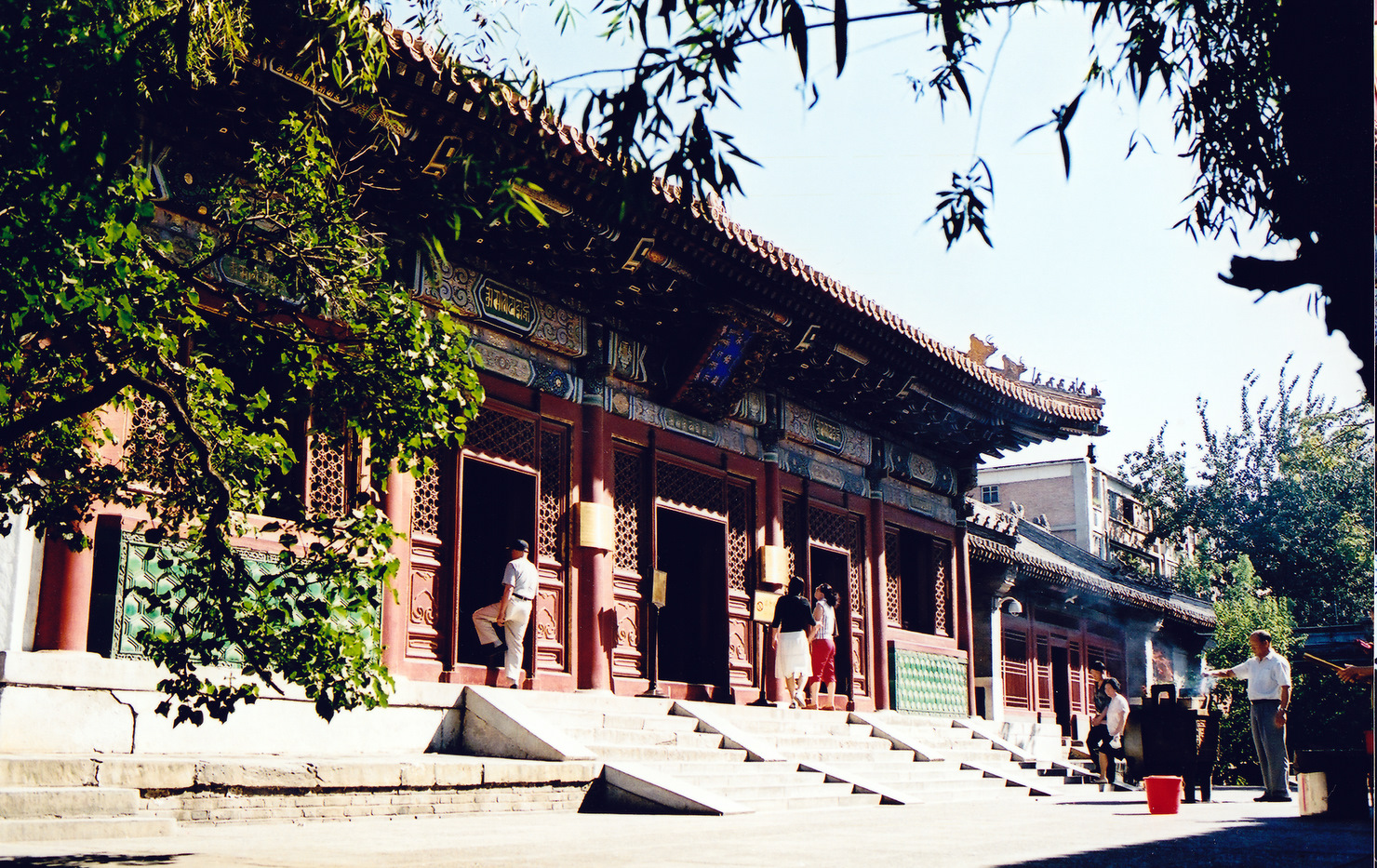 雍和宫永佑殿